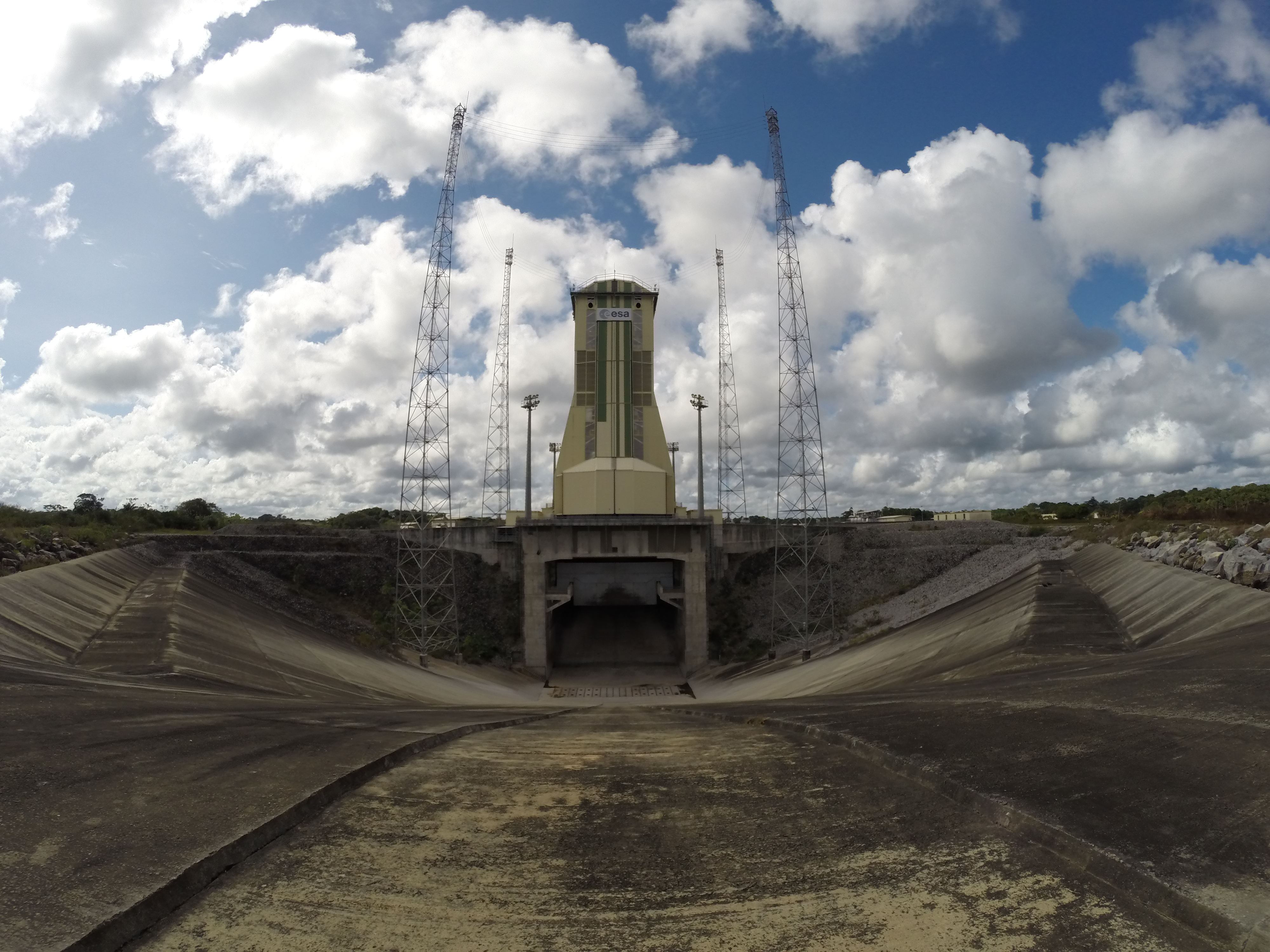 Carneau de déflexion des jets du pas de tir Soyouz au Centre Spatial Guyanais